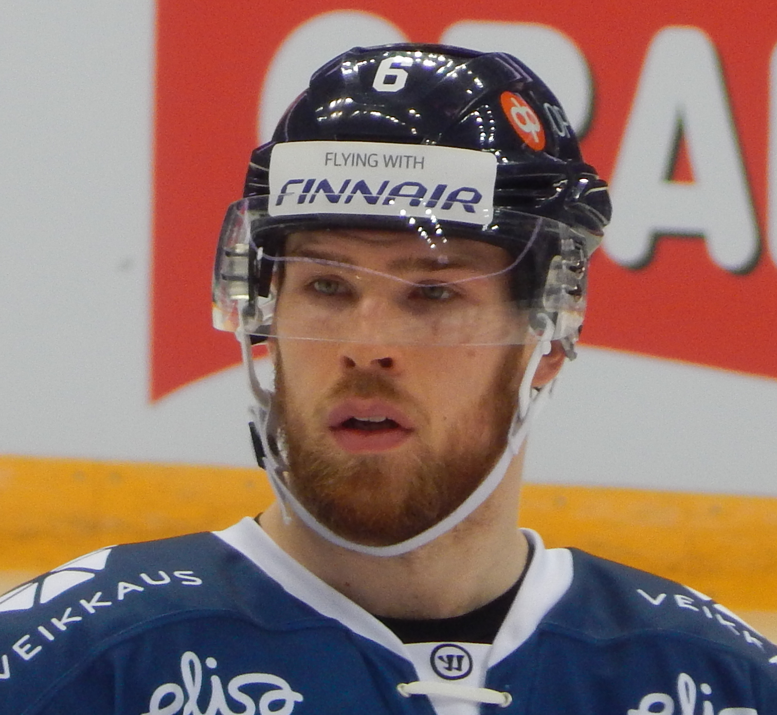 Кубок Первого Канала 2017, матч Финляндия - Южная Корея (15 декабря 2017) 6 HAKANPÄÄ,Jani